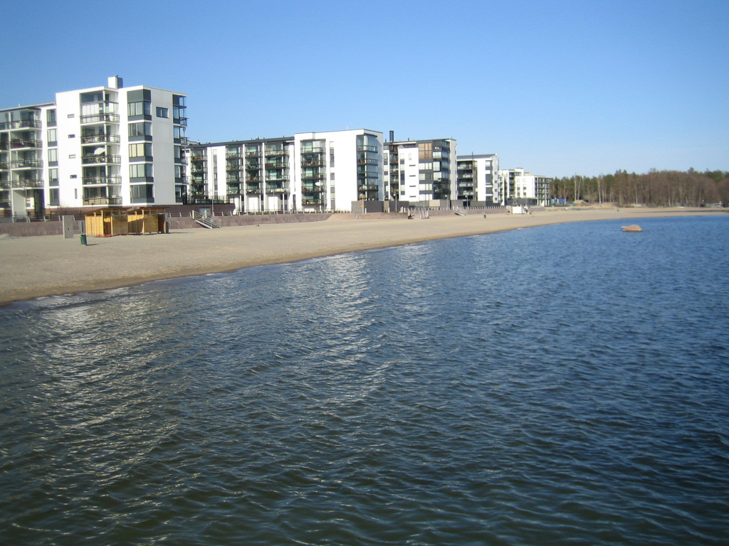 Aurinkoranta, Vuosaari, Helsinki